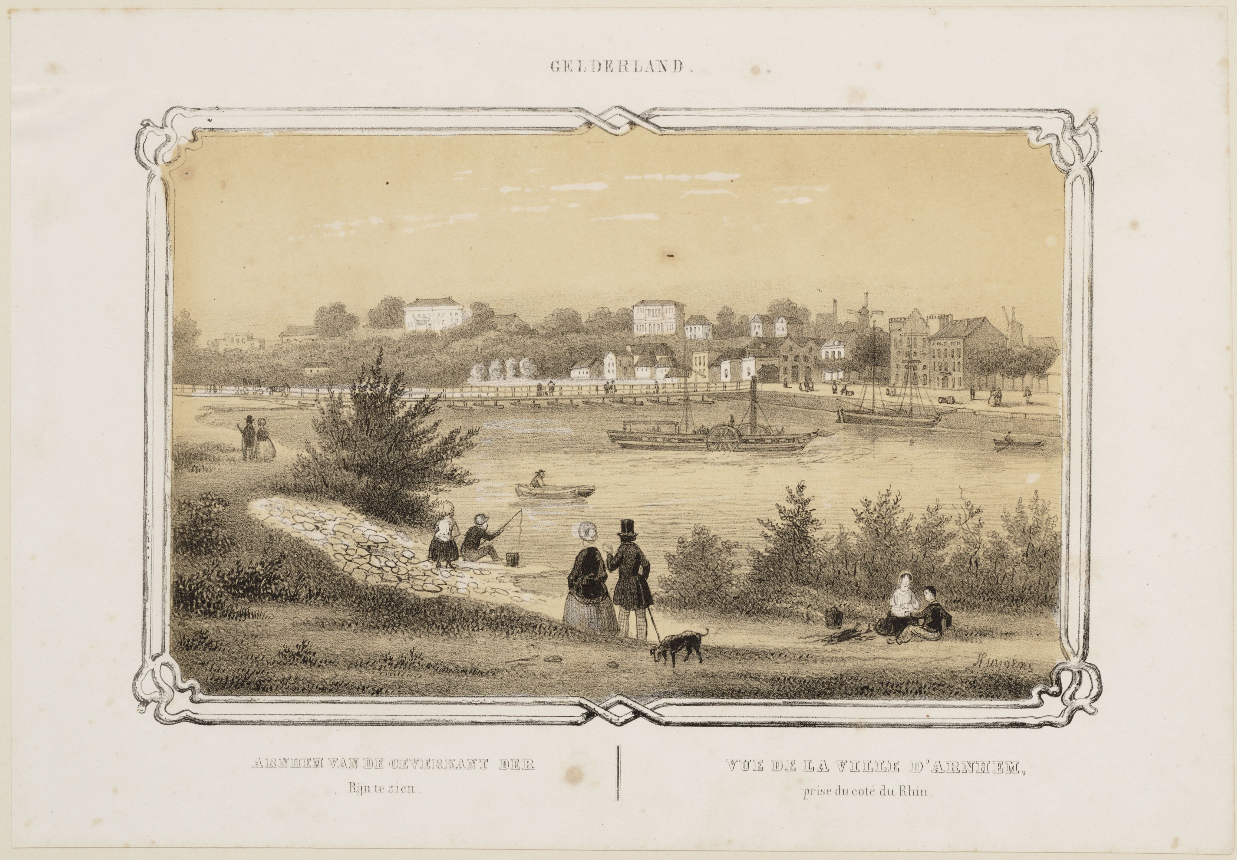 De Rijn